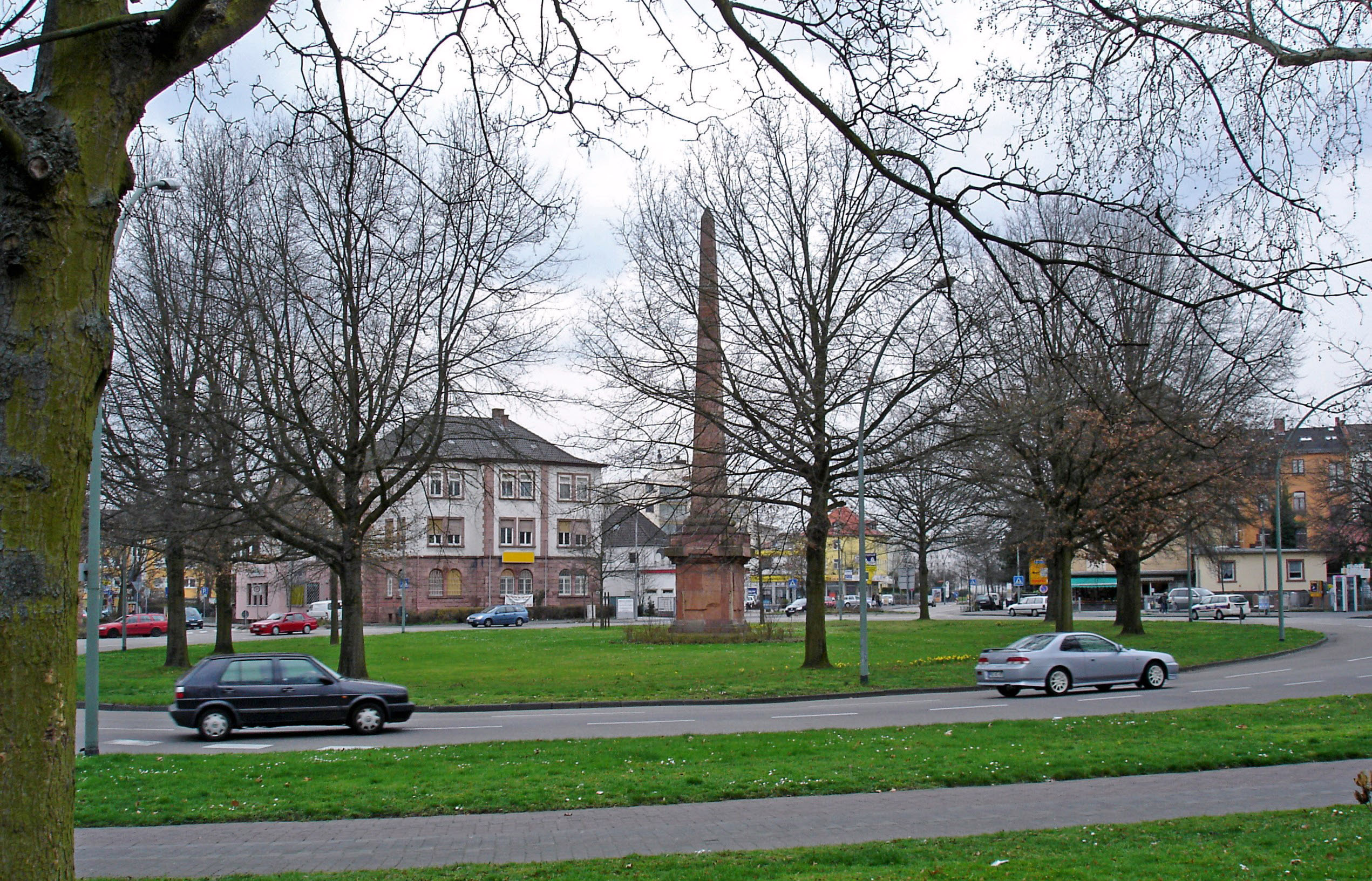 Die Ehrensaeule auf der Kreisverkehrsinsel vor dem Hauptfriedhof in Hanau